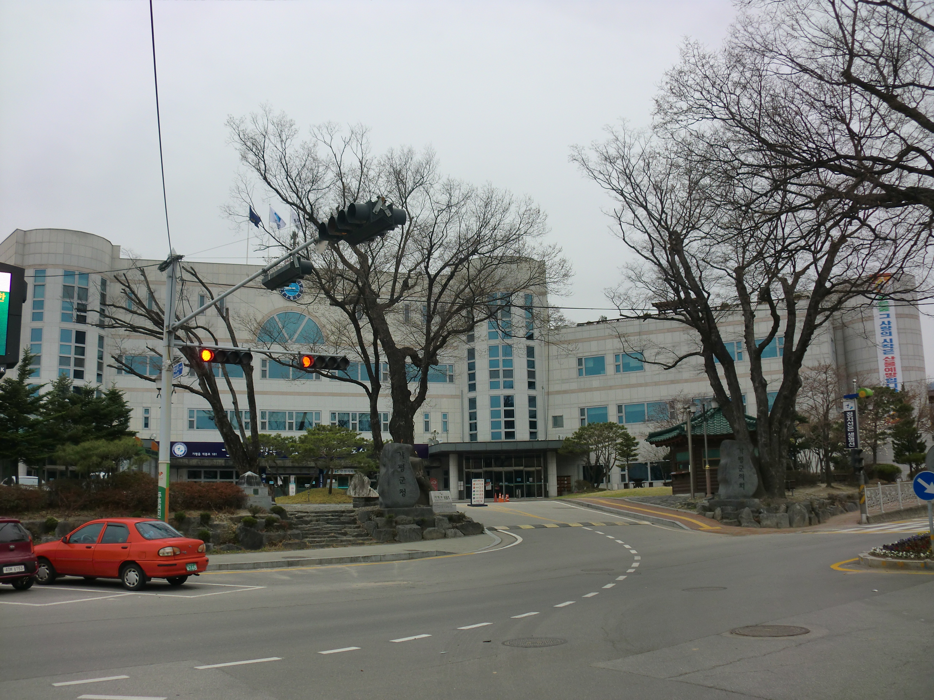 경기도 가평군에 있는 가평군청